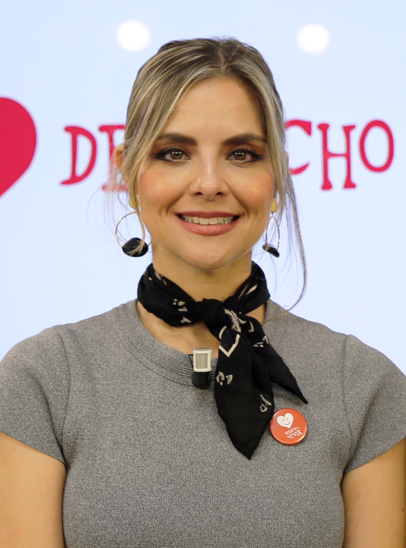 Patricia Sandoval